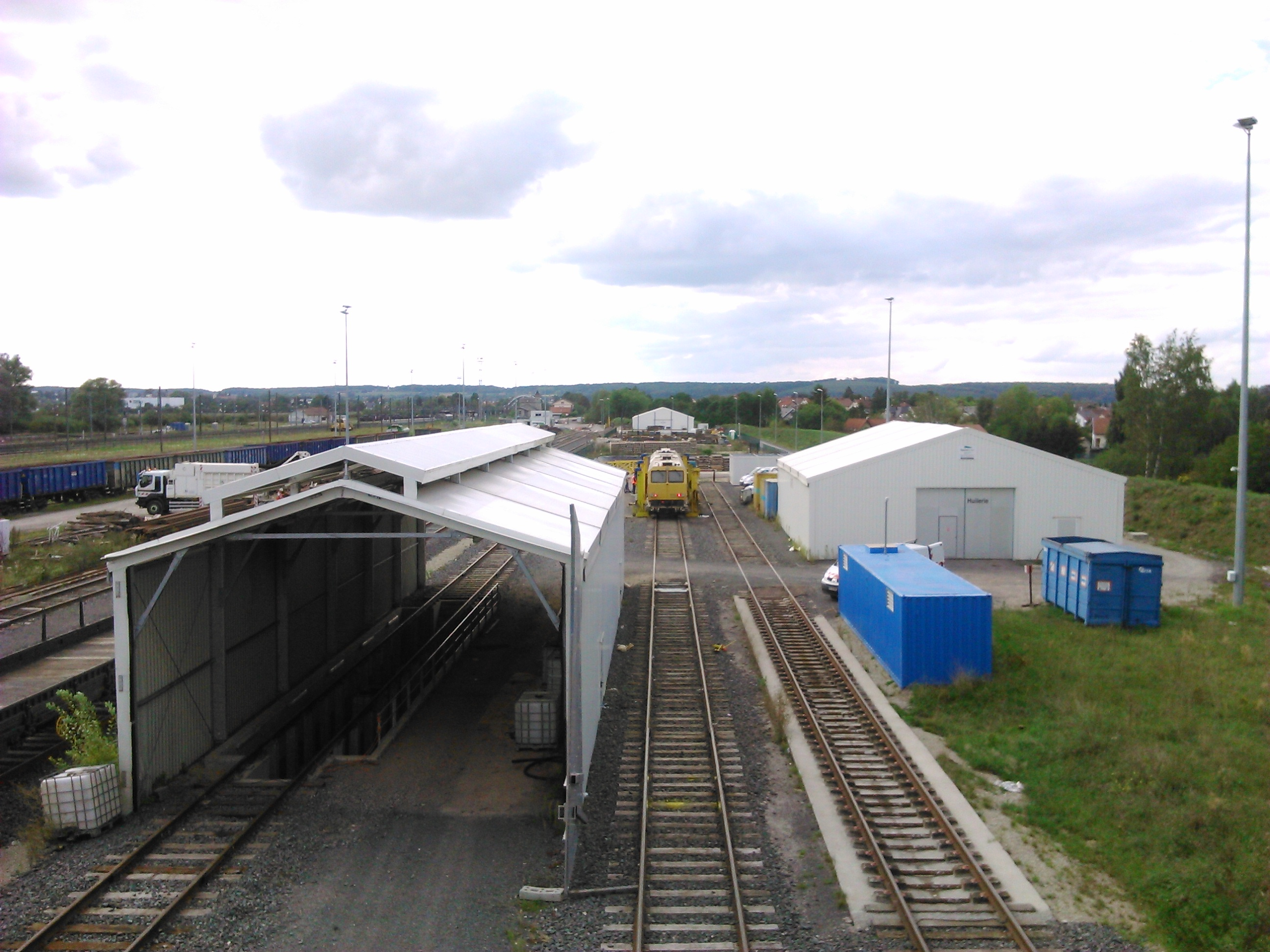 Gare de Réding